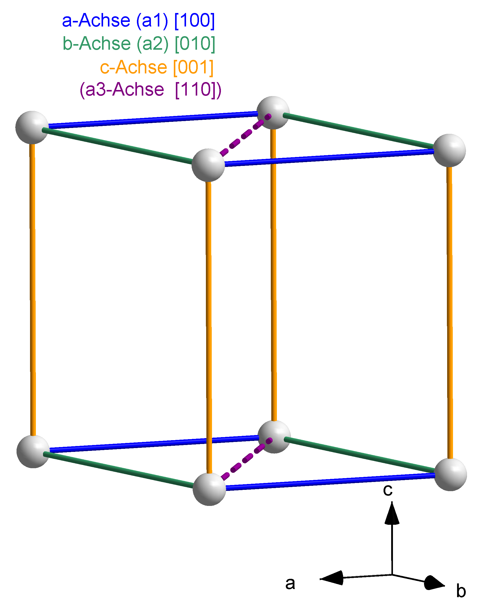 trigonal unit cell